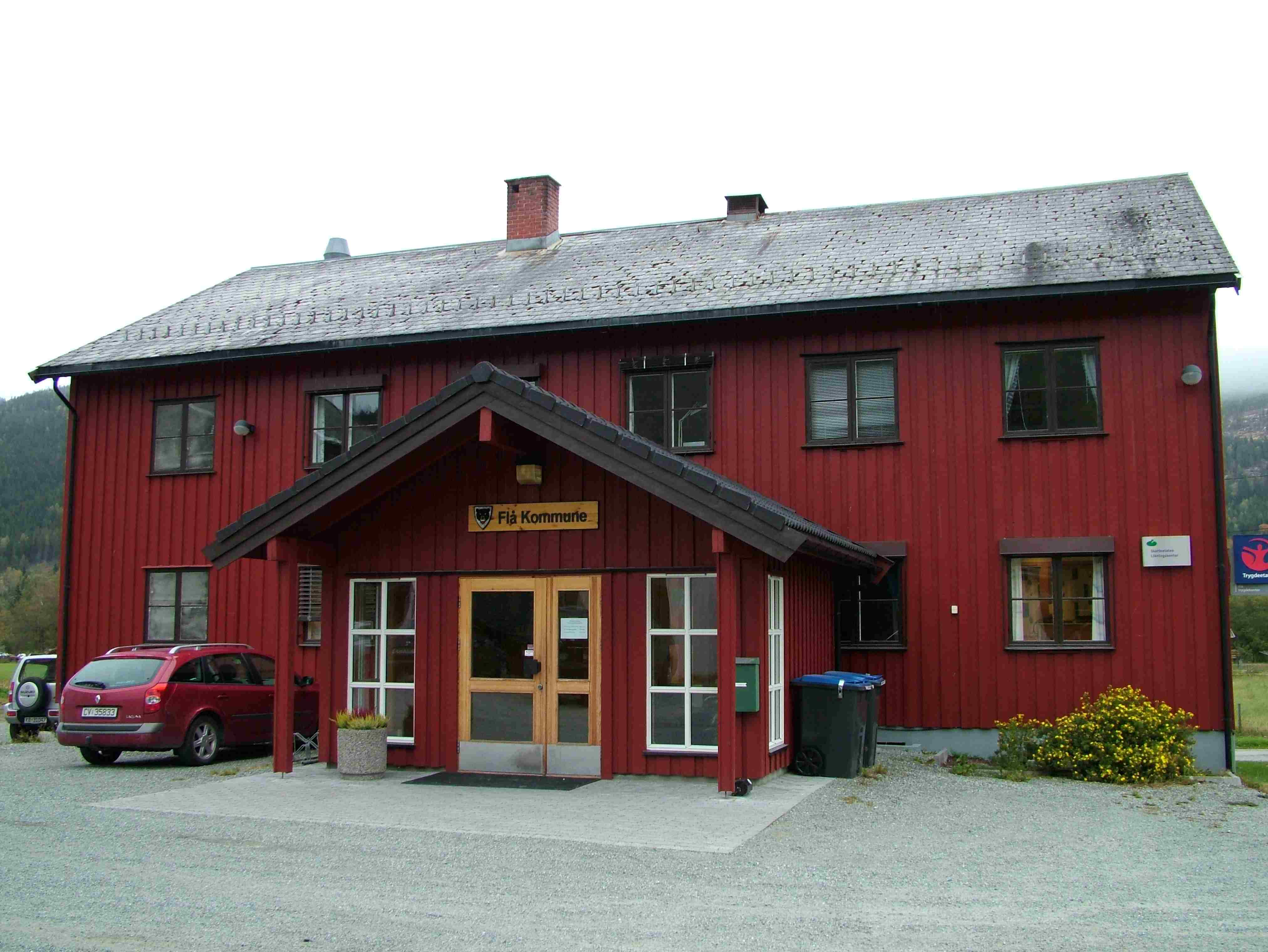 Flå in Norwegen. Das Bild zeigt die Verwaltung des Ortes.